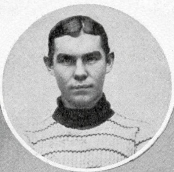 Le stayer Tom Linton, quatre fois recordman de l'heure derrière entraîneur, entre 1899 et 1902.